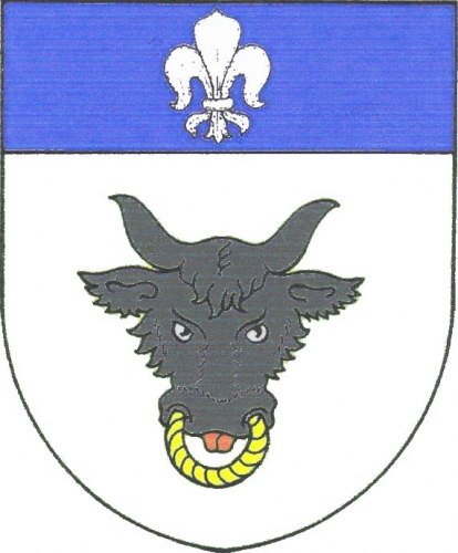 znak,Věchnov , okres Žďár nad Sázavou